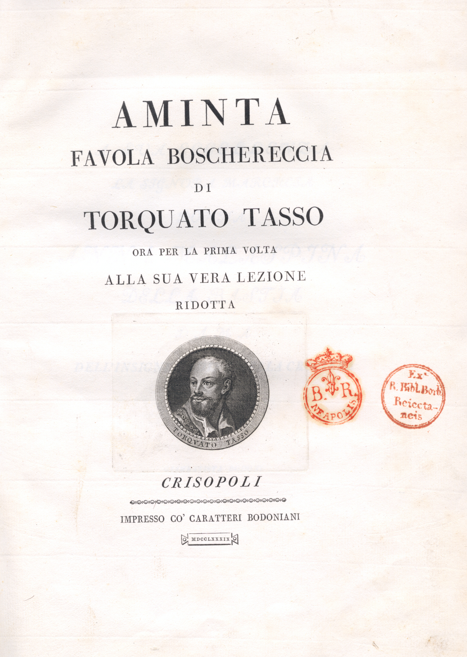 Aminta, favola boschereccia, Parma.